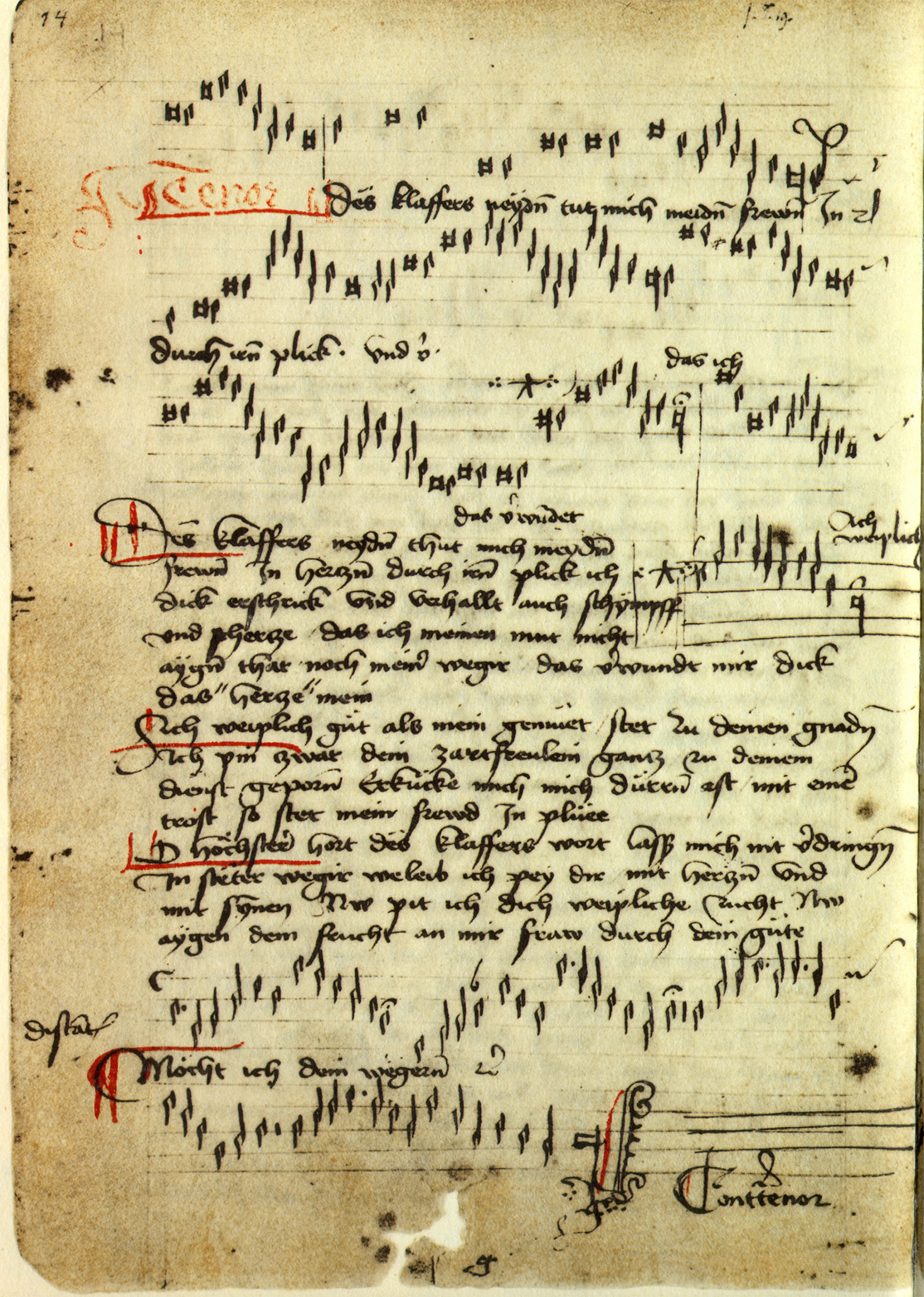 Lochamer Liederbuch, Berlin, Staatsbibl., Ms. Mus. 40613, Bl. 14v